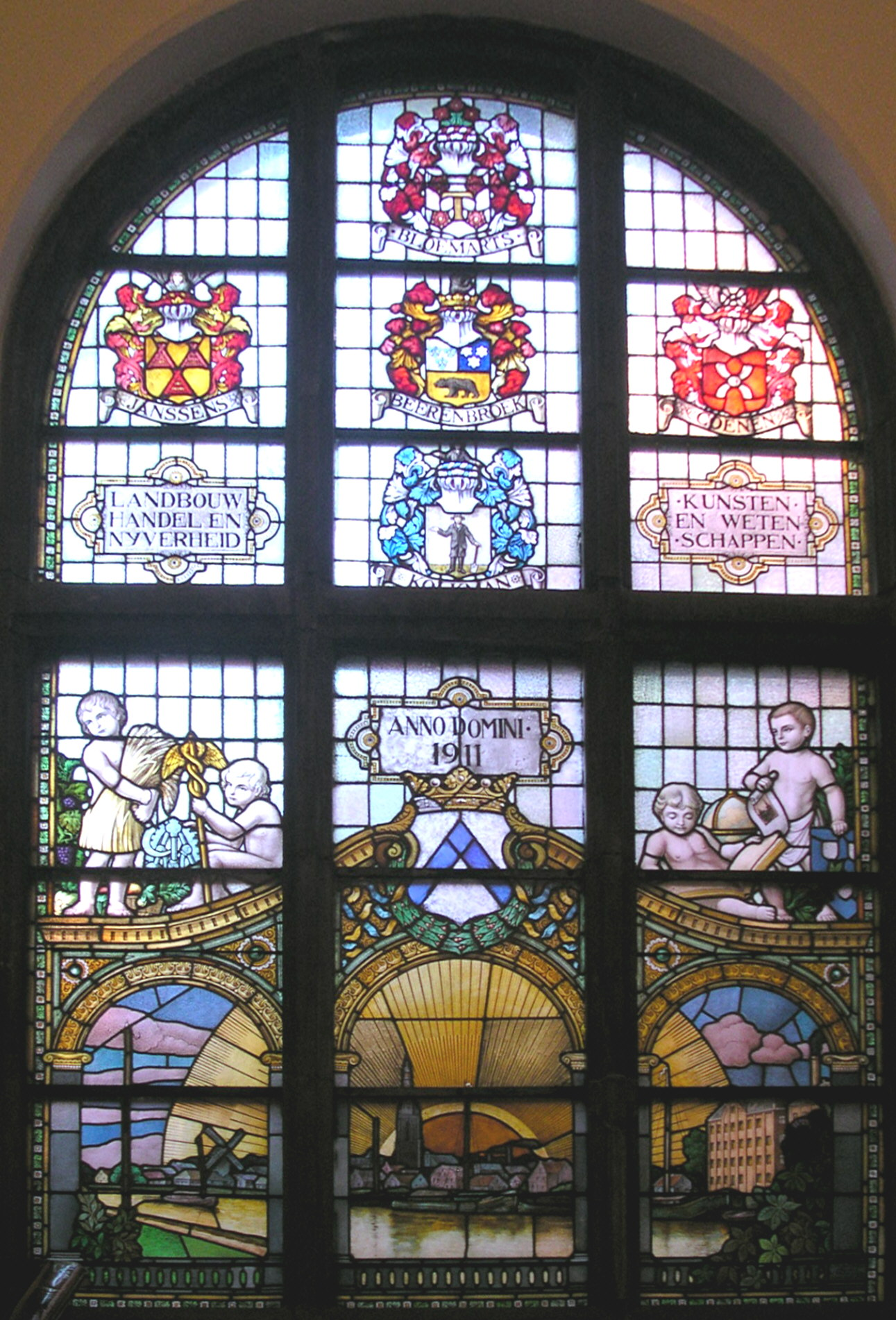 Glasfenster im Treppenhaus des Museums Jacob van Horne in Weert (NL)